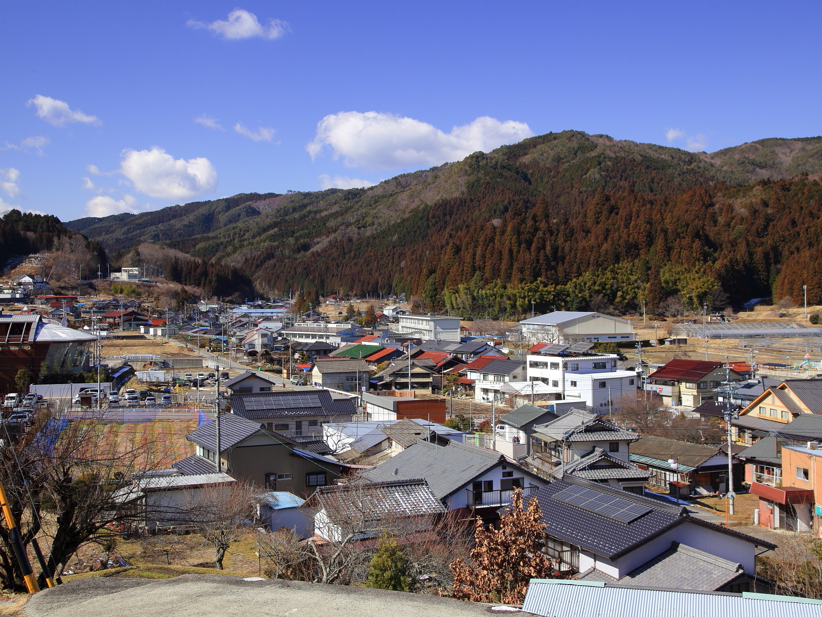 豊田市武節町および桑原町、2012年